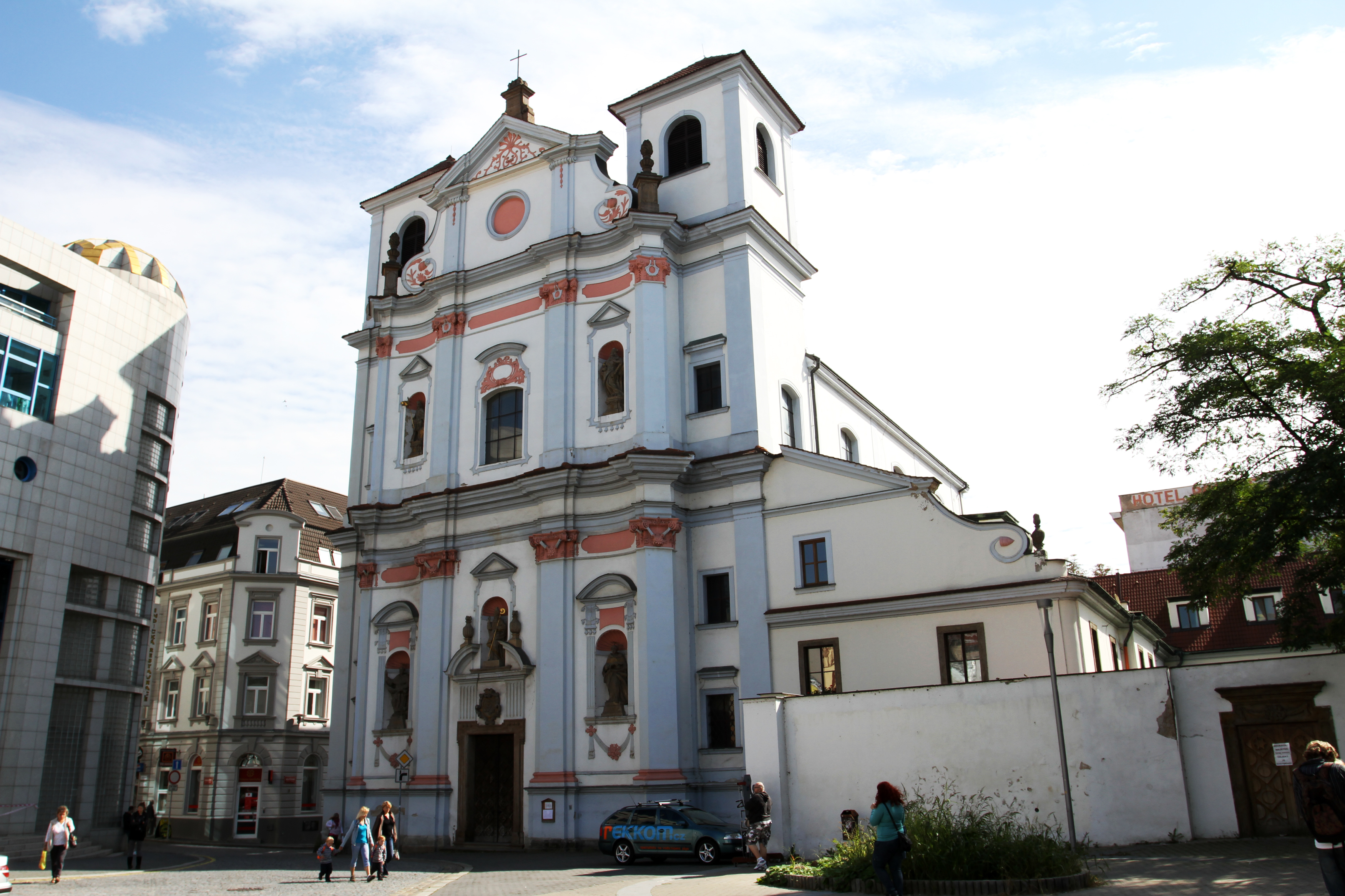 Klášter dominikánský s kostelem sv. Vojtěcha (Ústí nad Labem), Hradiště 97/4, Ústí nad Labem